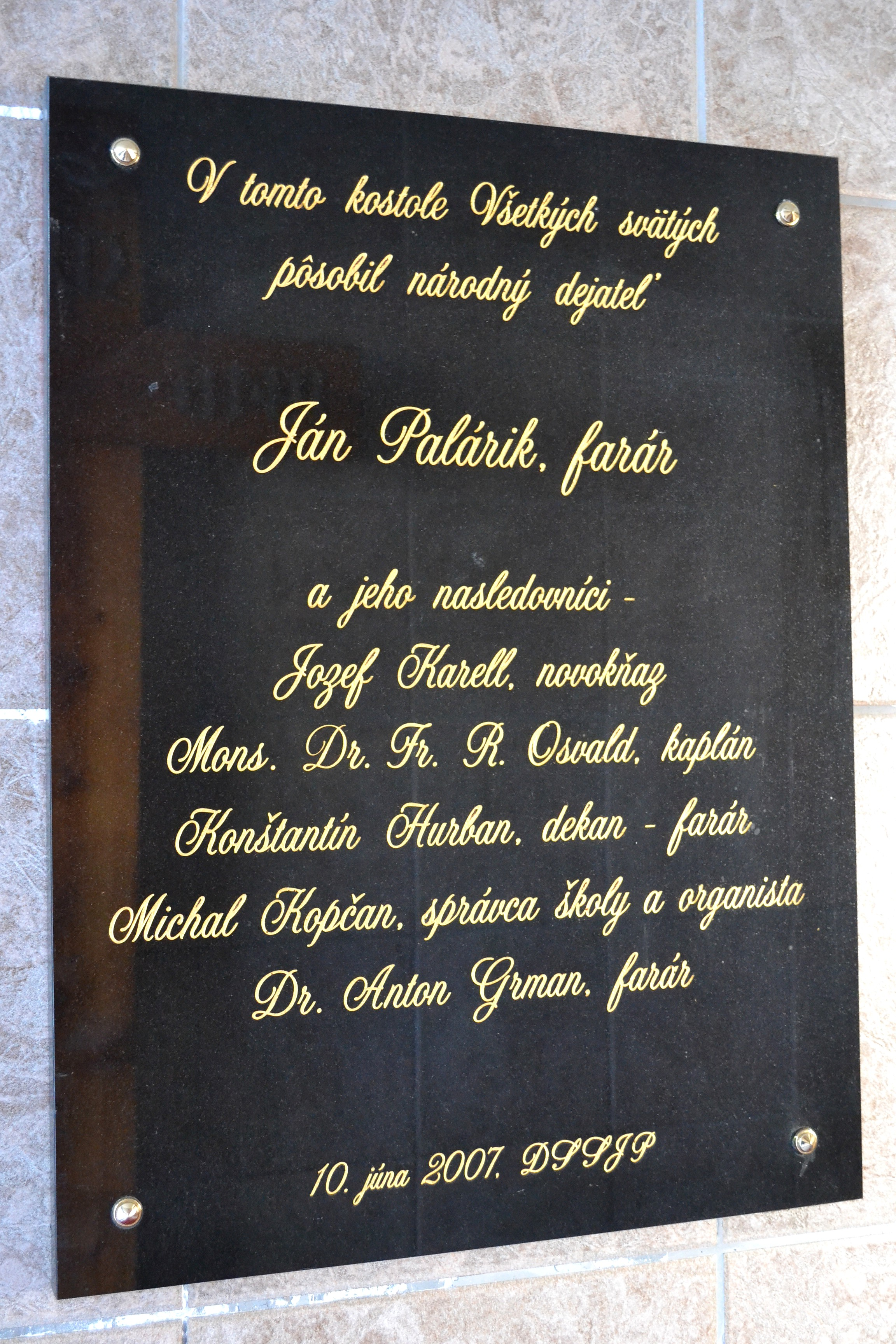 Majcichov (okr. Trnava), Kostol Všetkých svätých; pamätná tabuľa venovaná spisovateľovi a miestnemu kňazovi Jánovi Palárikovi v predsieni kostola